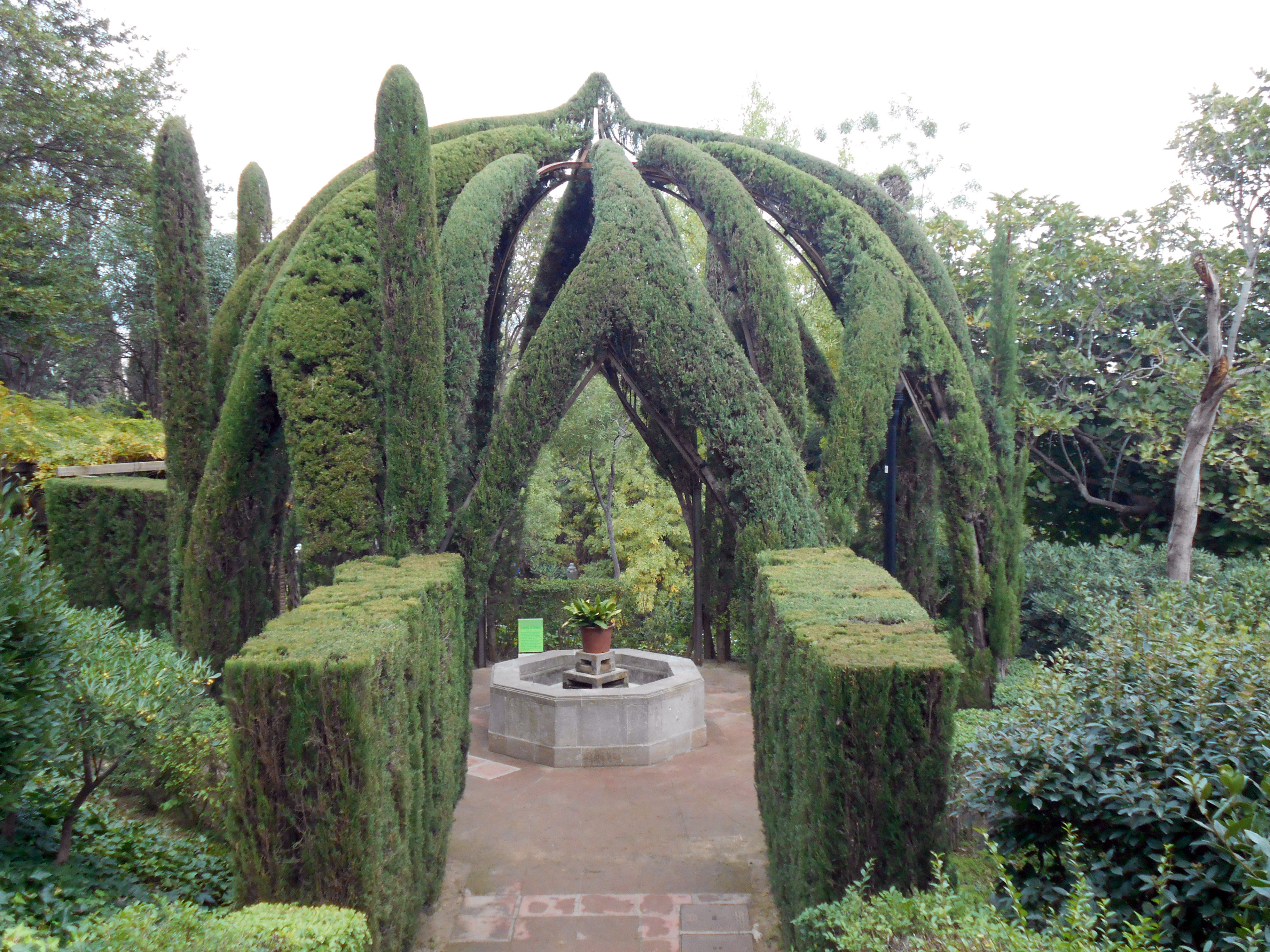 Glorieta de cipreses, Jardines de Laribal.